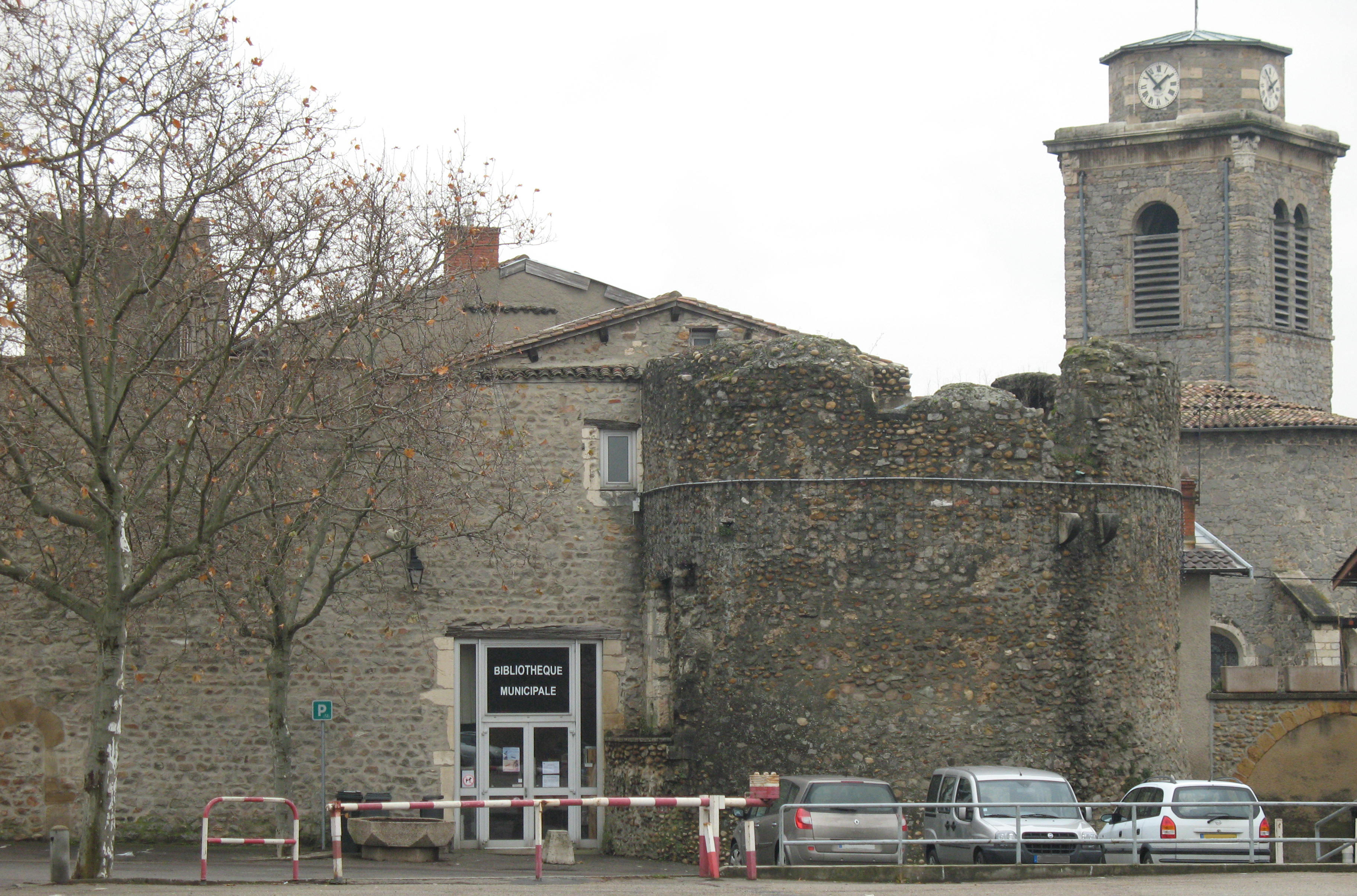 Château d'Irigny dans le Rhône